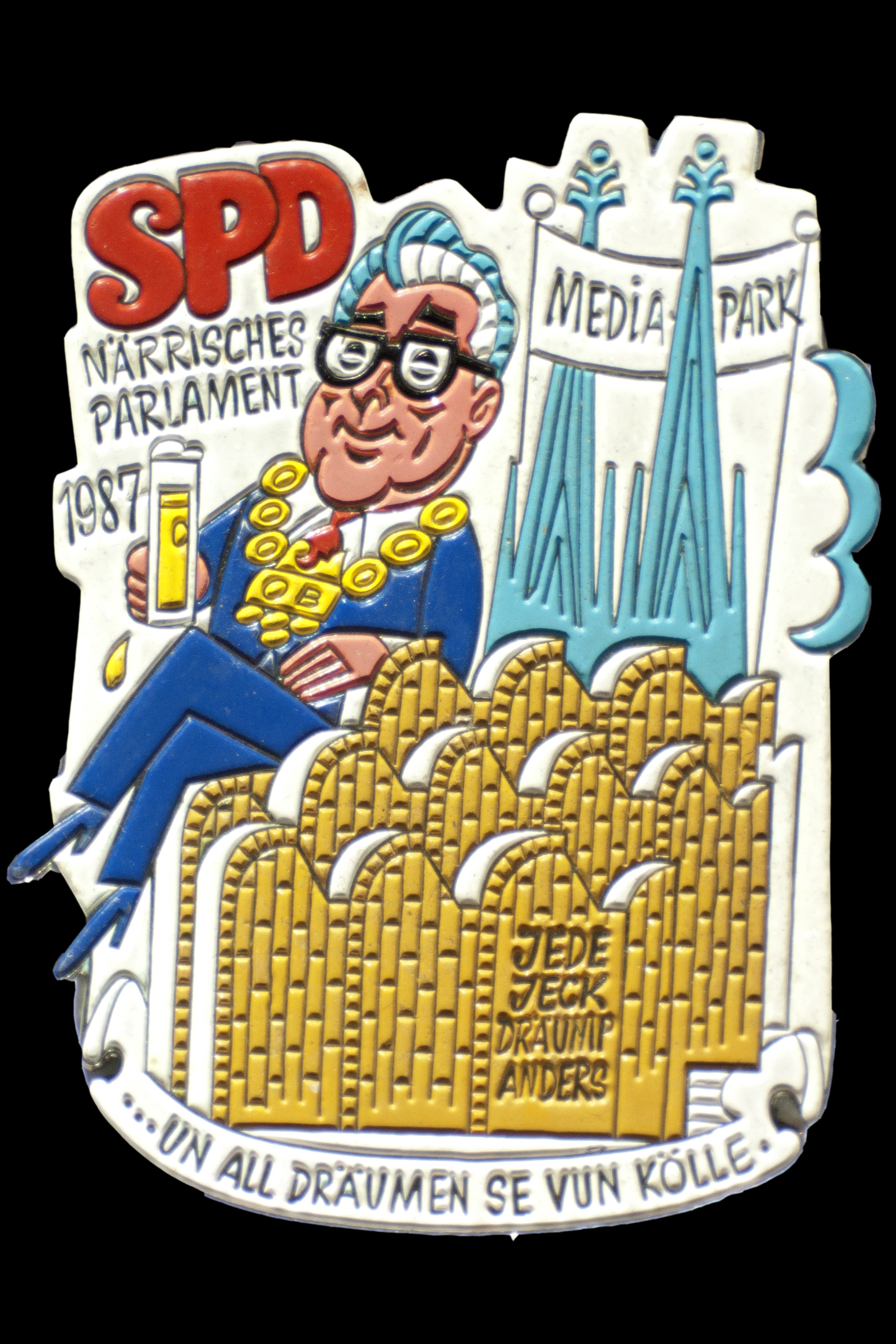 Kölner Karnevals Orden, Närrisches Parlament, SPD, Köln, 1987